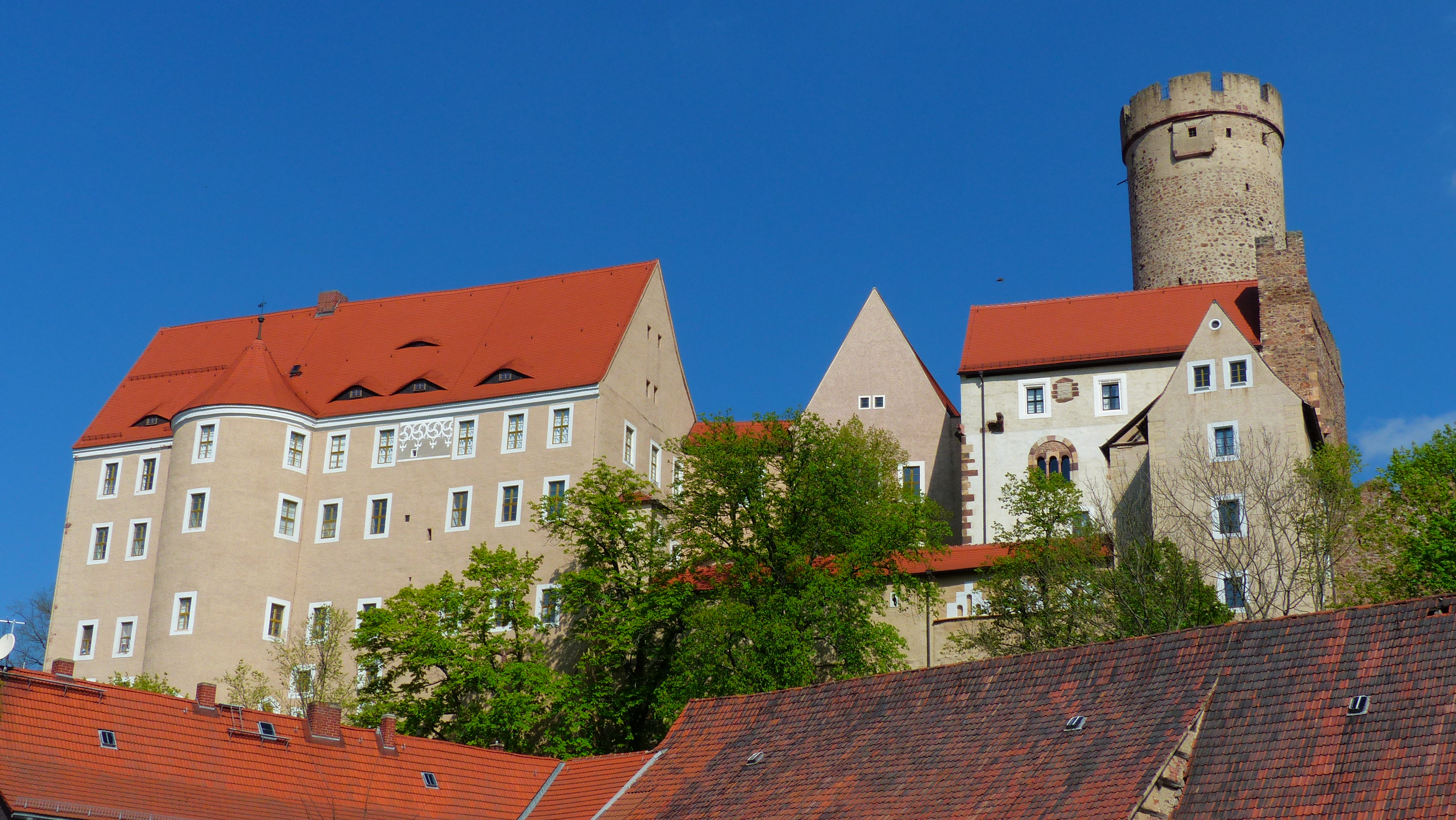 Burg Gnandstein (Sachsen): Ansicht von Süden mit Neuer Kemenate, Palas und Bergfried